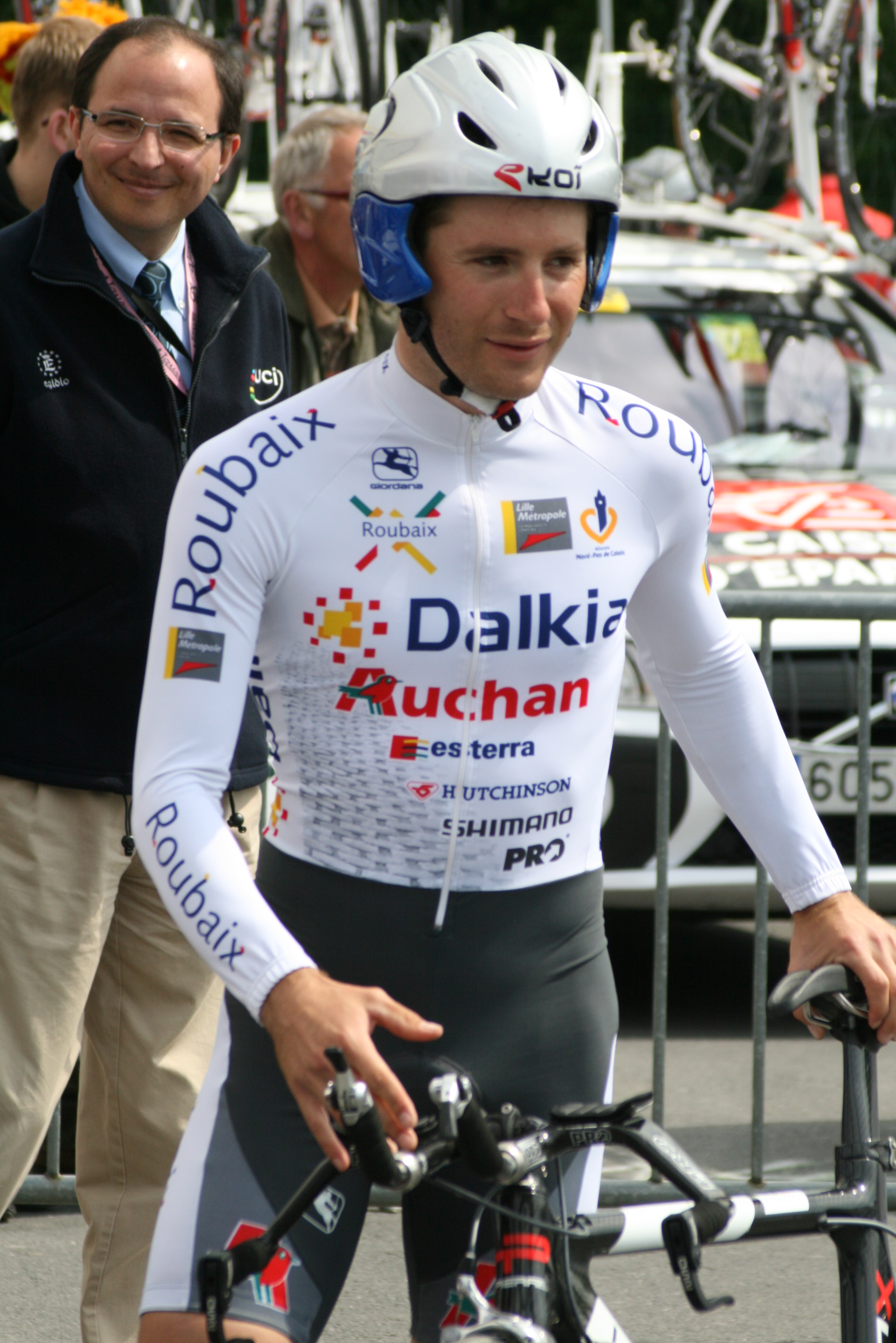 Pierre Cazaux, lors des Quatre jours de Dunkerque 2009, à Douai